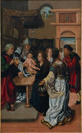 A Apresentação no Templo é um painel do Políptico da Capela-mor da Sé de Viseu, que foi criado,como os outros no período entre 1501 e 1506. Tendo de altura 132 cm e de largura 83 cm, a obra representa o episódio bíblico da Apresentação de Jesus no Templo.